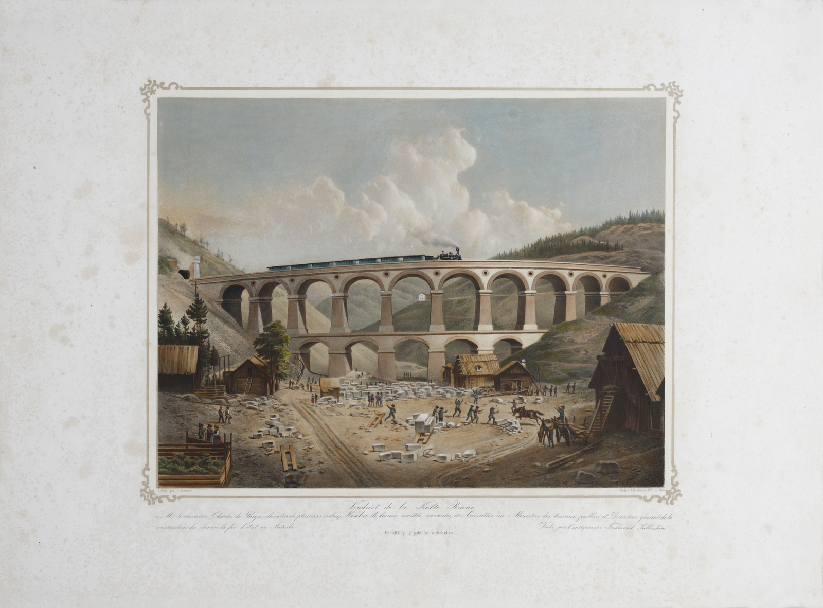 Lithographie des Kalte Rinne-Viaduktes der Semmeringbahn